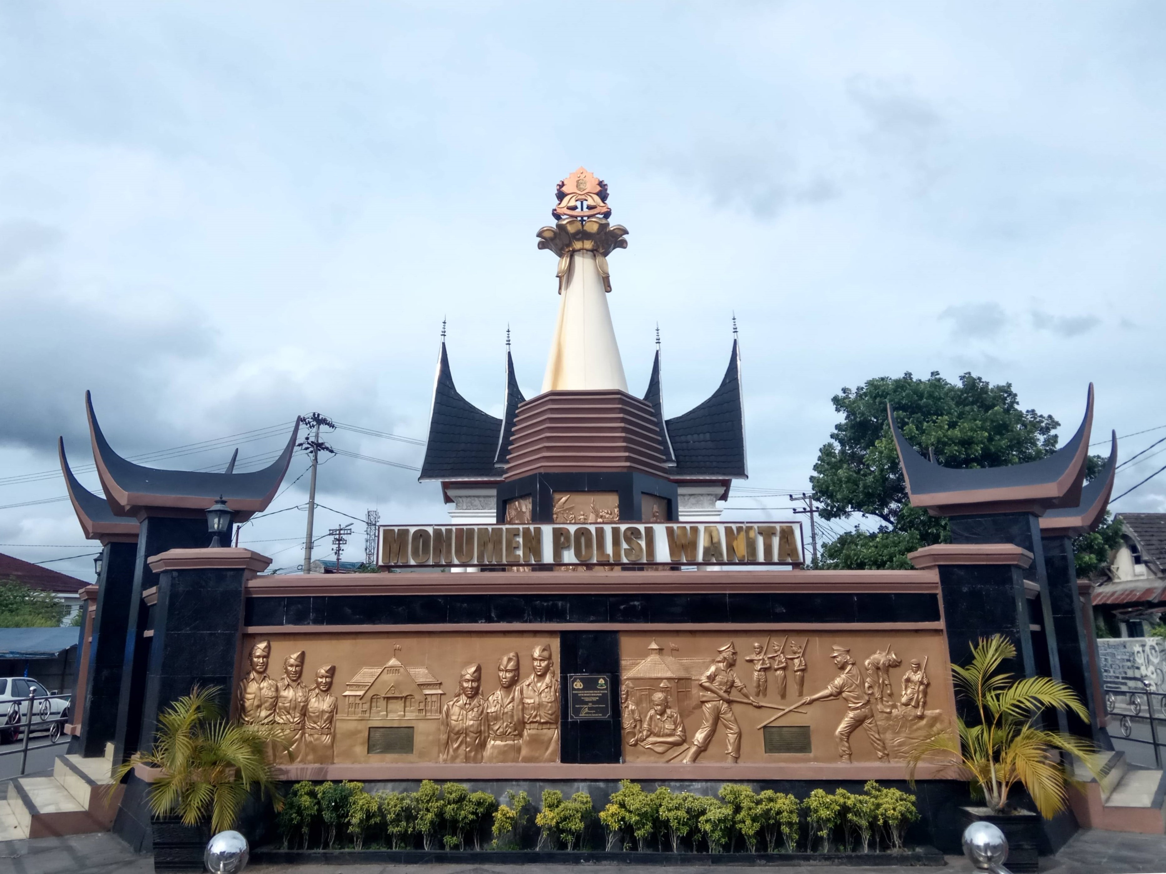 Monumen Polisi Wanita Indonesia